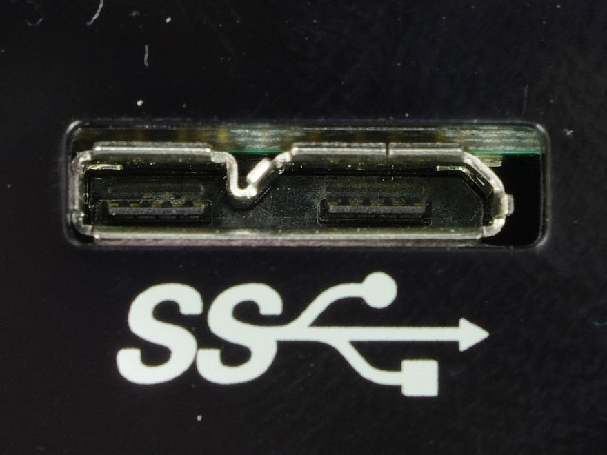 Steckverbindung USB 3.0